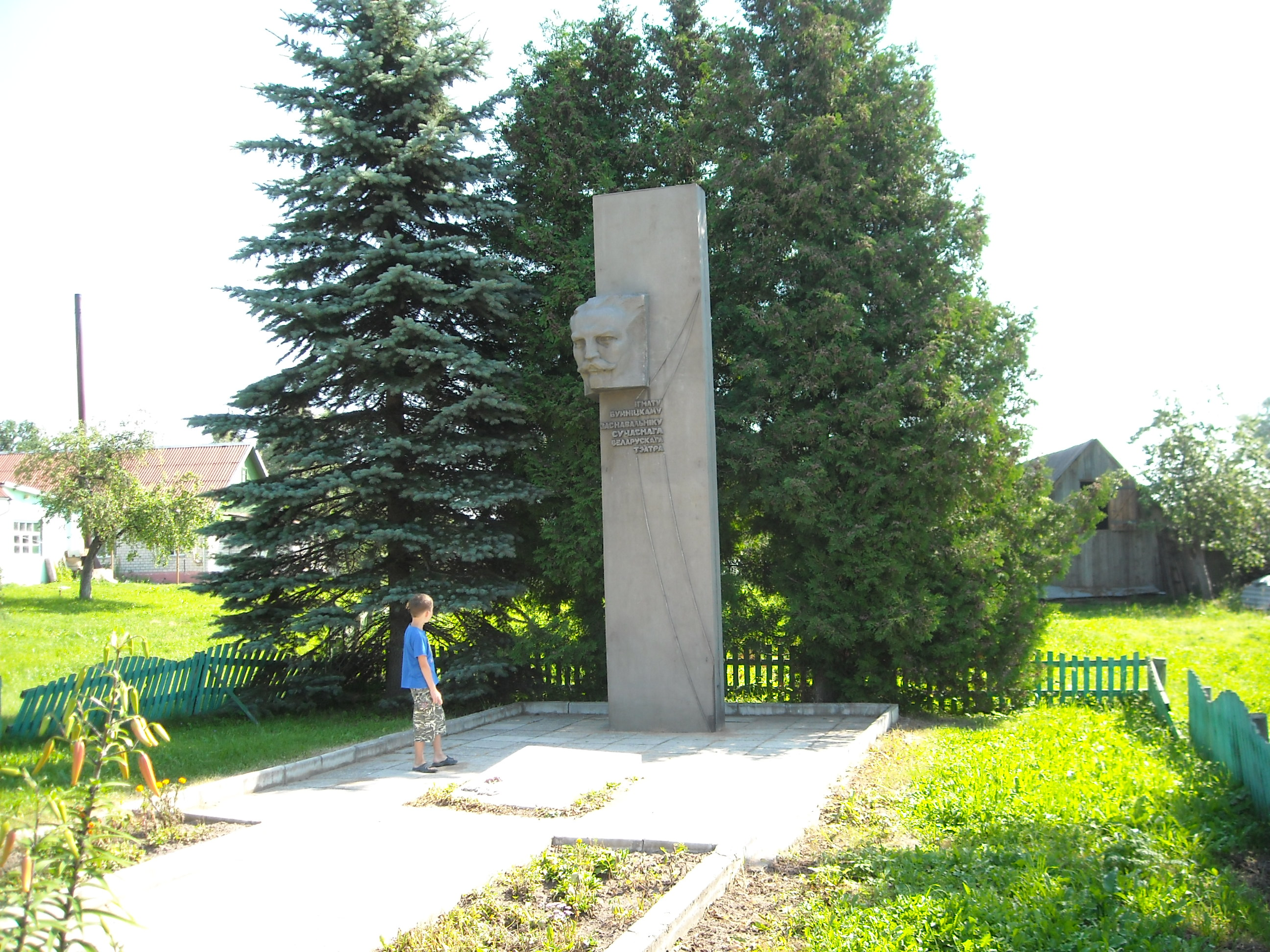 Беларуская (тарашкевіца): Помнік на магіле І. Ц. Буйніцкага. в. Празарокі This is a photo of Belarusian heritage monument. Reference number: 213Д000409 ( WLM)